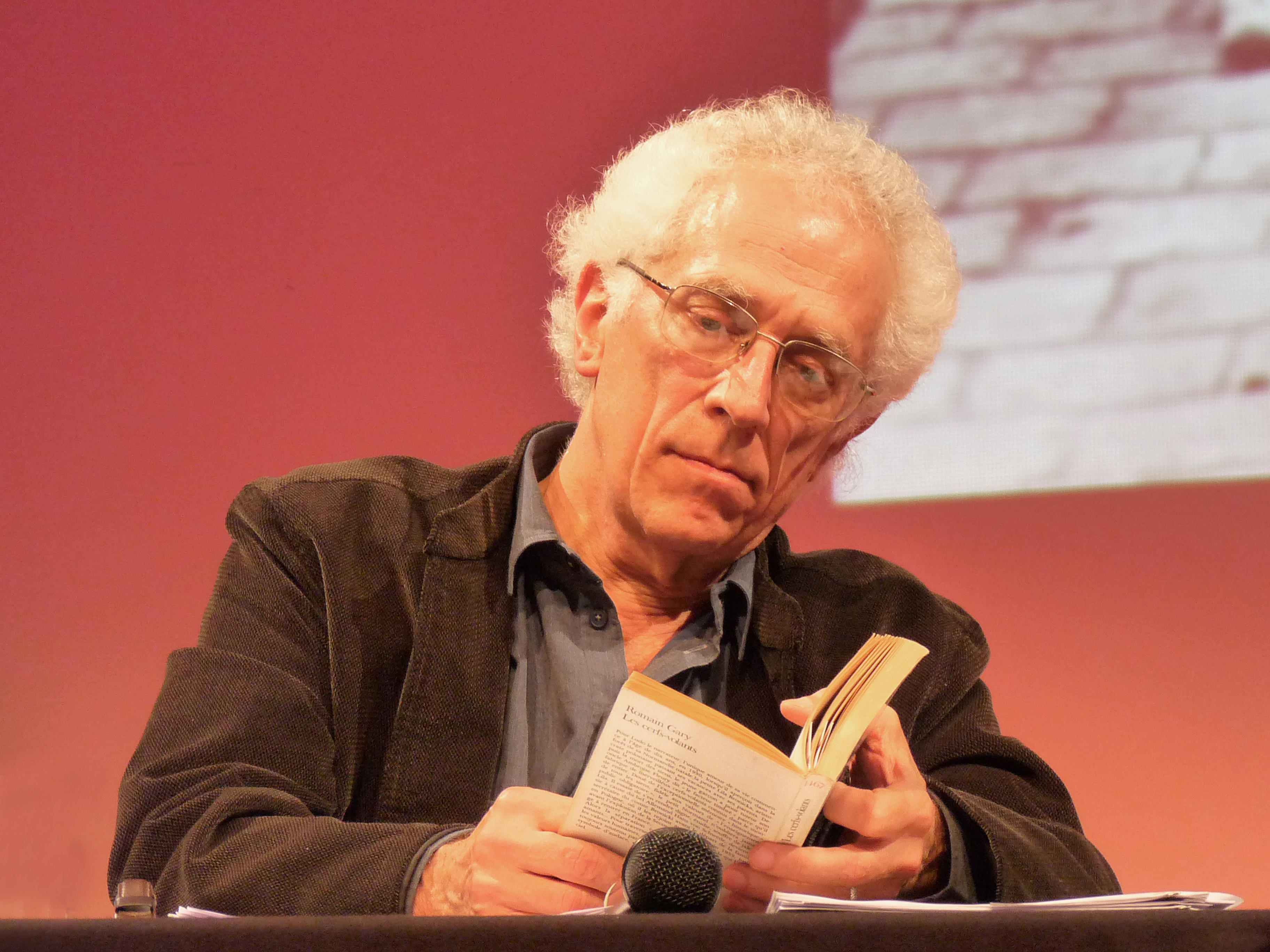 Rencontre avec Tzvetan Todorov (en compagnie d'Antoine Audouard et Anouk Grinberg) autour de ses derniers ouvrages, Georges Jeanclos, Goya à l'ombre des Lumières et L'Expérience totalitaire. La signature humaine (2011), dans le cadre de la semaine littéraire Bibliothèques idéales (Aubette, Strasbourg)